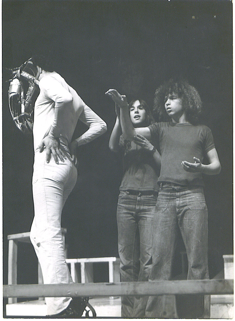 מימין: יפתח קצור, אמירה פולן ואבי יקיר בהצגה "אקווס" של התיאטרון הקאמרי.